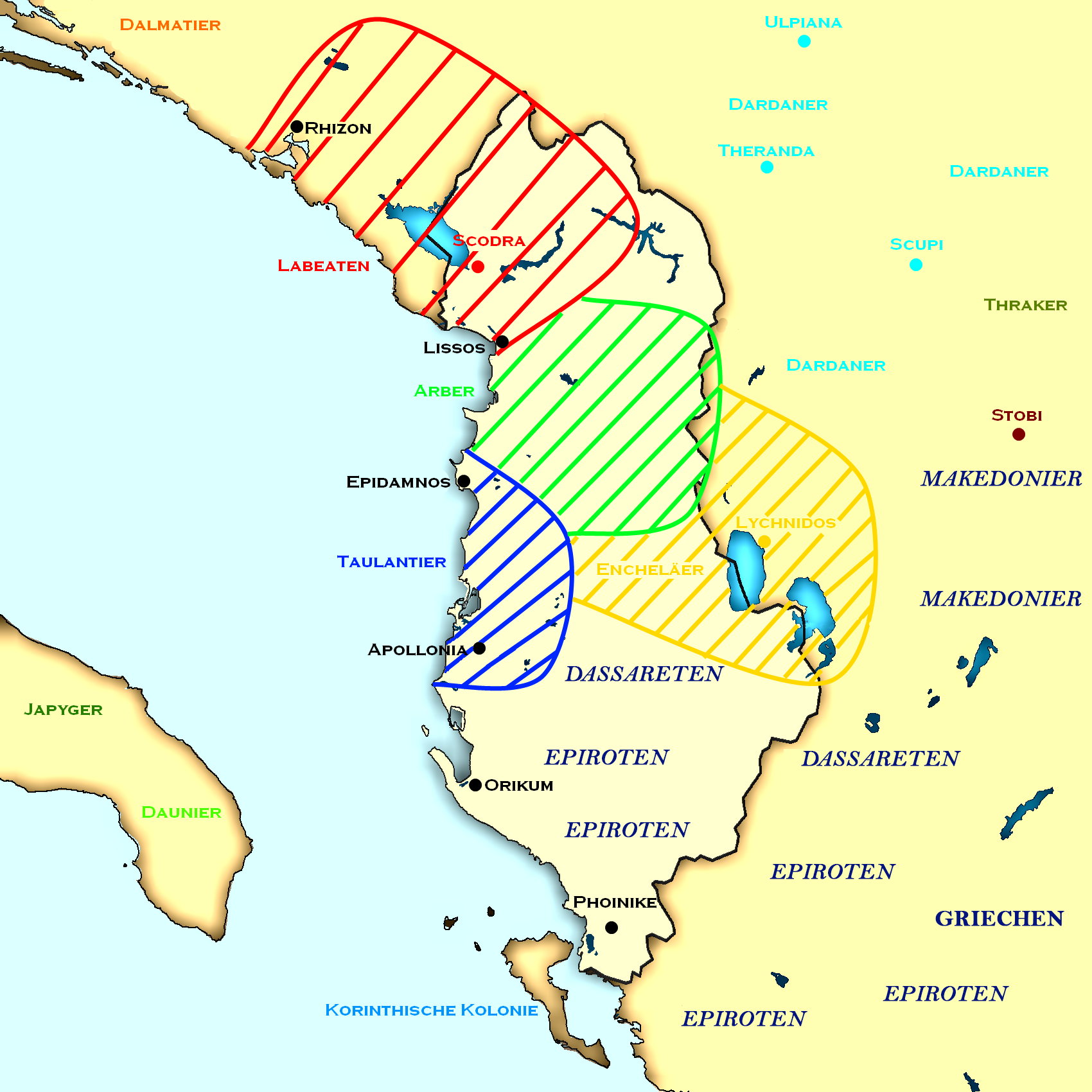 Südillyrische Stämme im heutigen Albanien. schwarze Städte sind griechische Kolonien (Epidamnos, Apollonia, Lissos und Rhizon) oder Städte (Phoinike und Orikum)